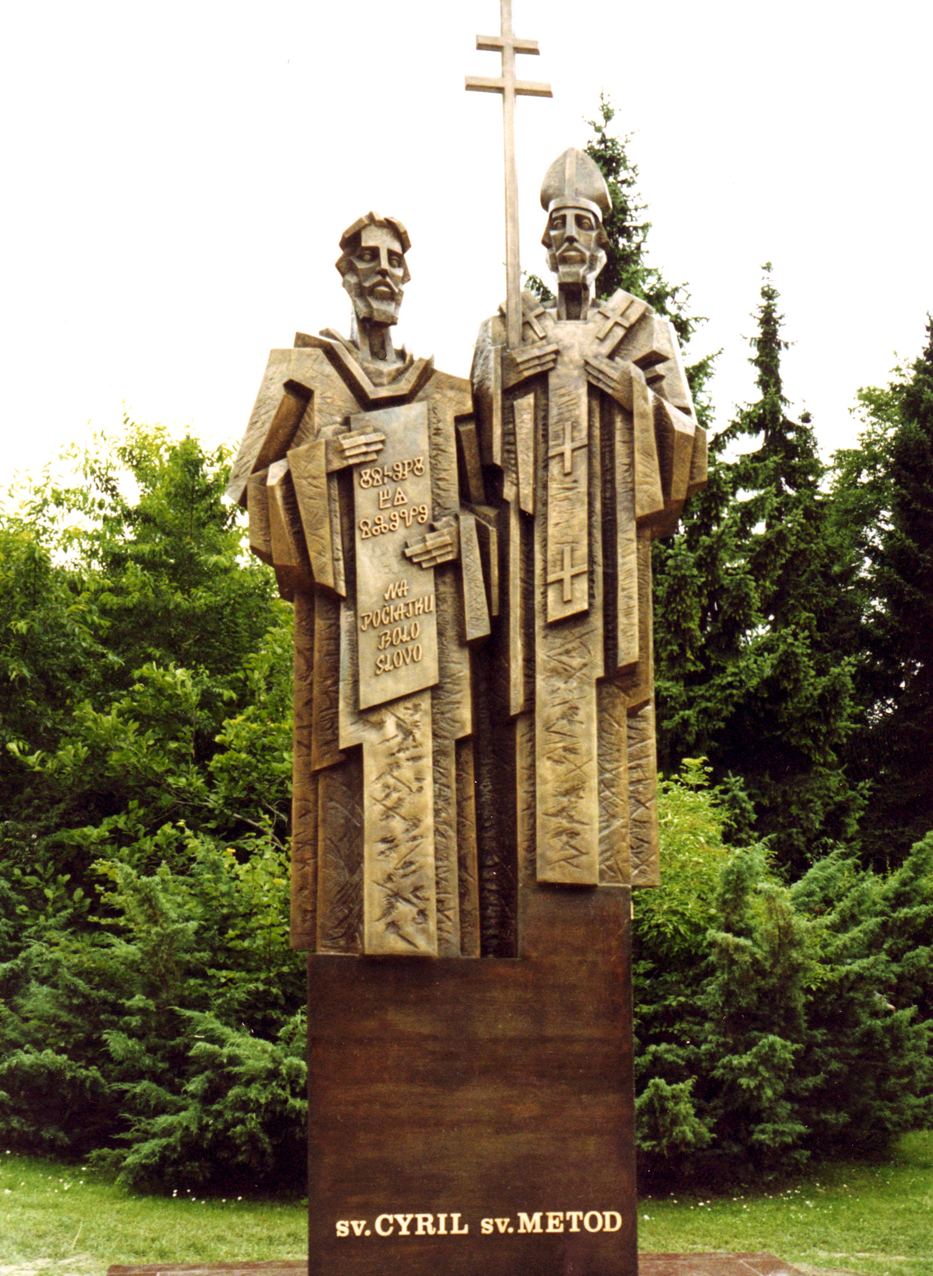 Bronzová plastika sv. Cyrila a sv. Metoda